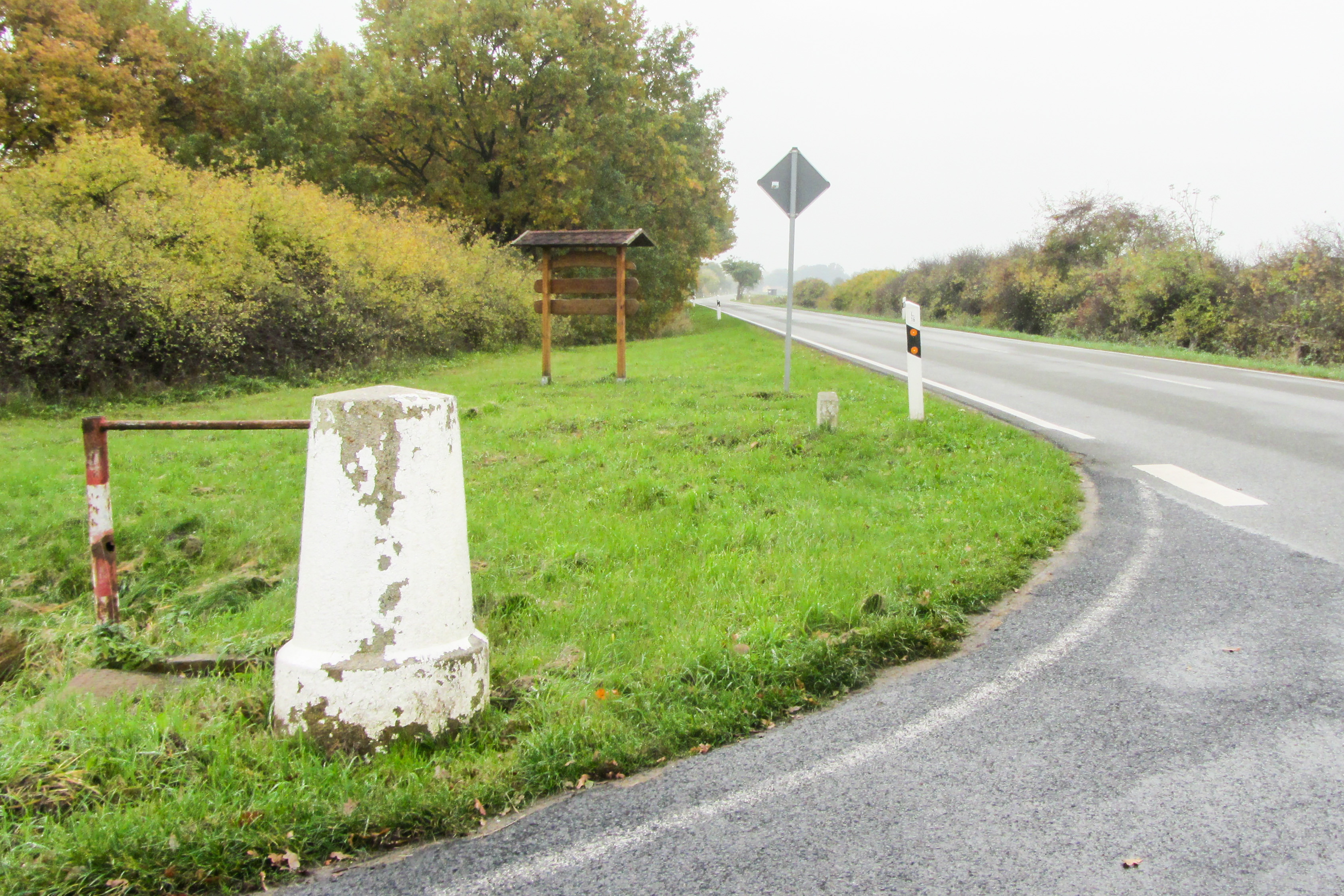 Preußischer Rundsockelstein (2284) in Behrendorf, an der L 16 Abzweig K 1066 Berger Straße. Blick zum Standort